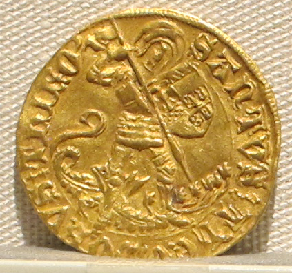 Palazzo Massimo alle Terme